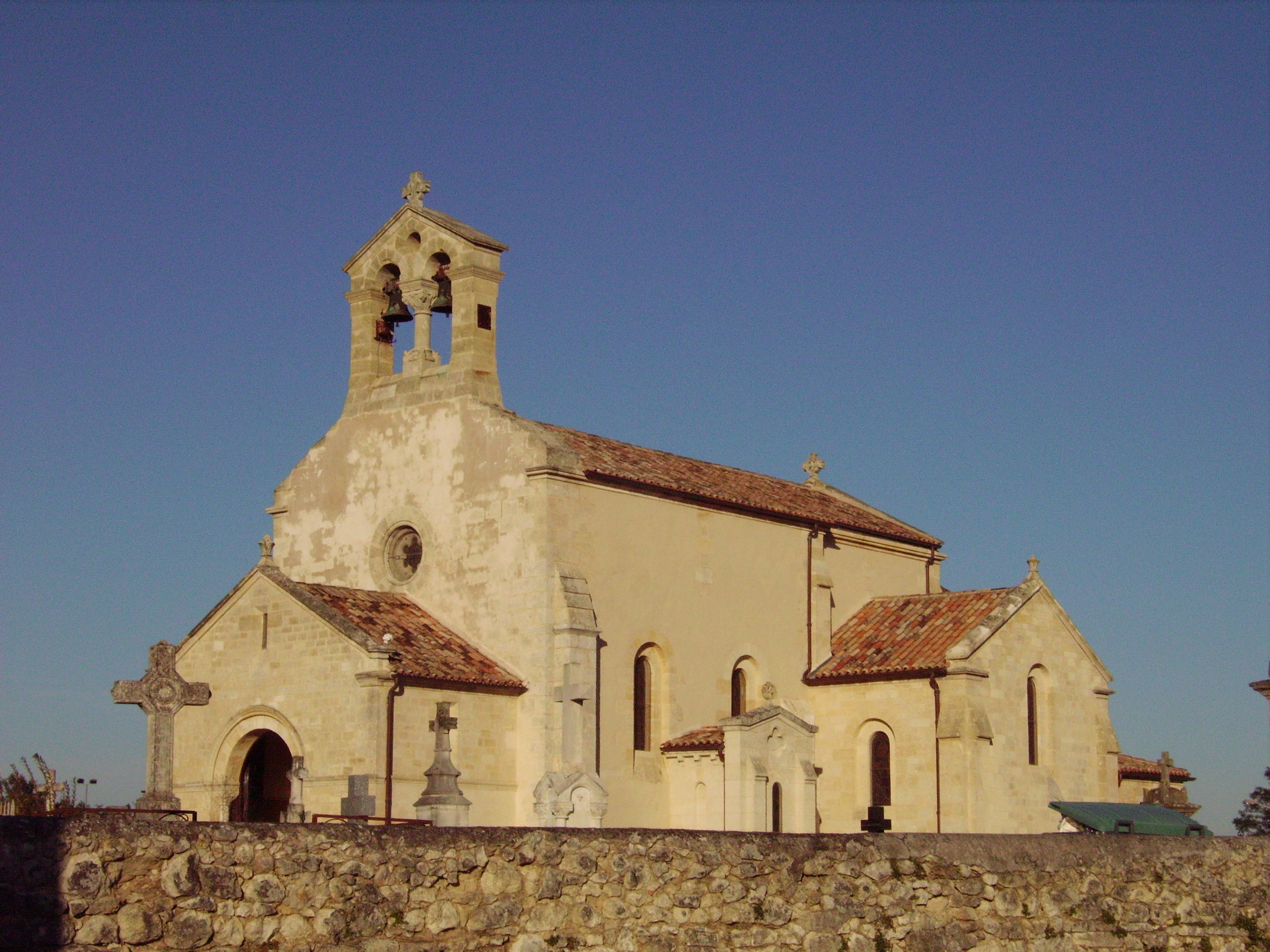 Eglise de saint médard d'Eyrans